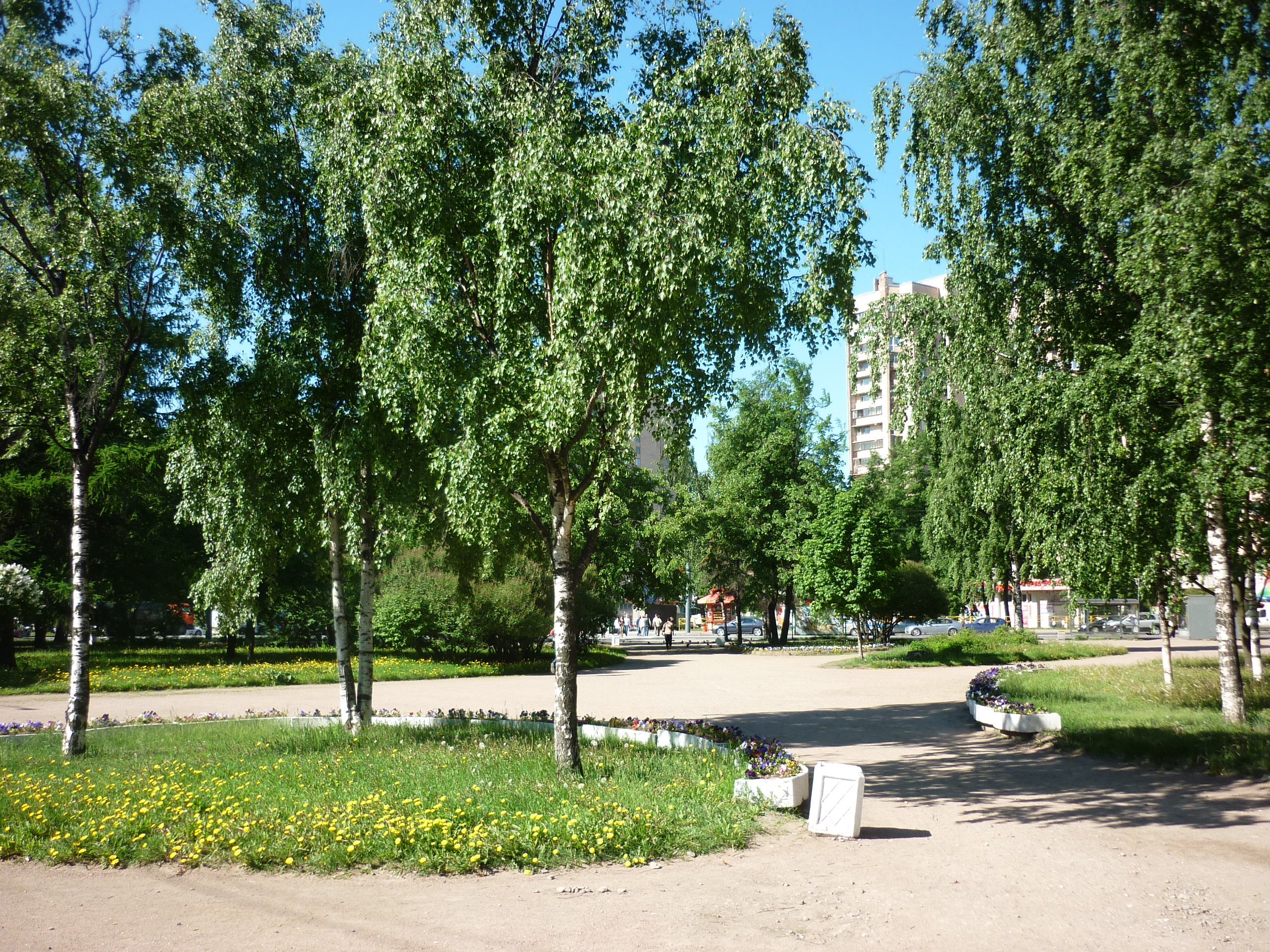 Muzhestva Square